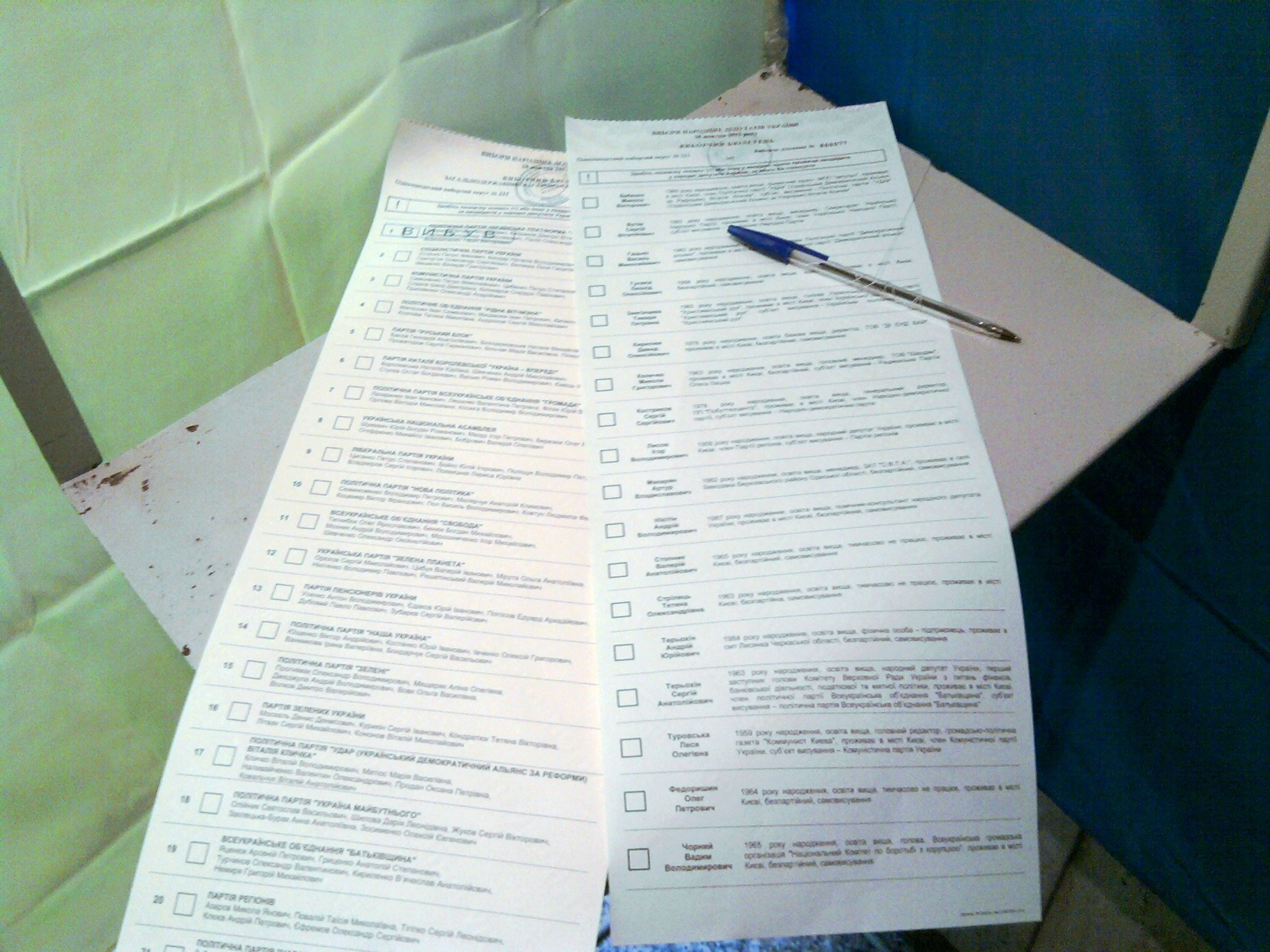 Бюллетень